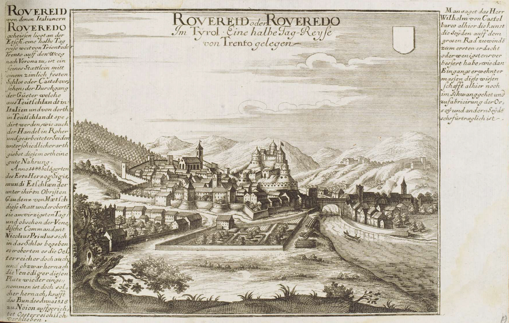 Curioses Staats und Kriegs Theatrum Dermahliger Begebenheiten im Tyrol : durch Unterschiedliche Geographische, Hydrographische, Topographische, Chronologische, Genealogische, Historische &c. Carten, Abrisse, und Tabellen Erlaeutert, Augspurg : Stridbeck, [ca. 1700] Rovereid